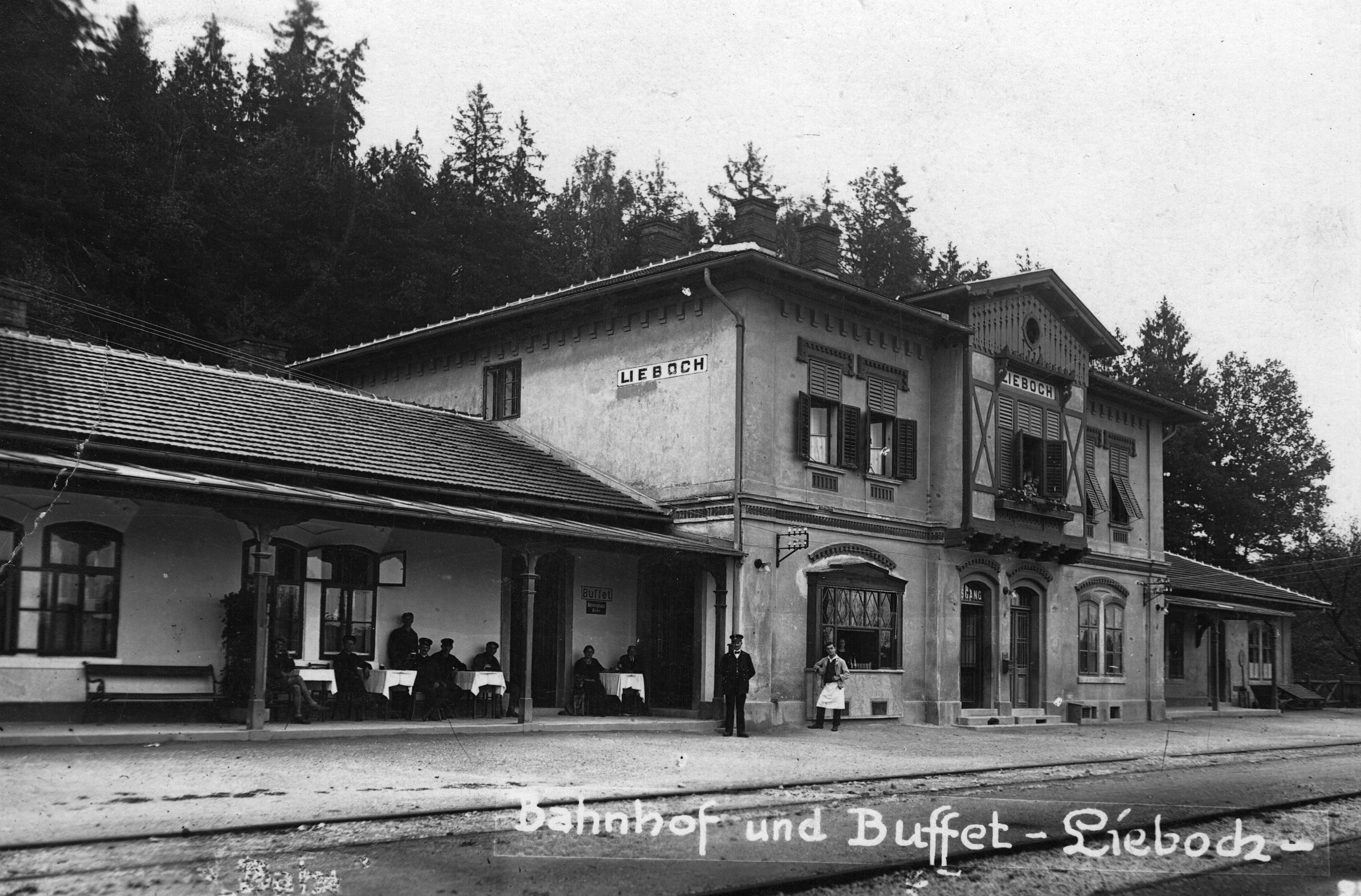 Historische Aufnahme des Bahnhofs von Lieboch zu einem nicht näher bekannten Zeitpunkt in der ersten Hälfte des 20. Jahrhunderts